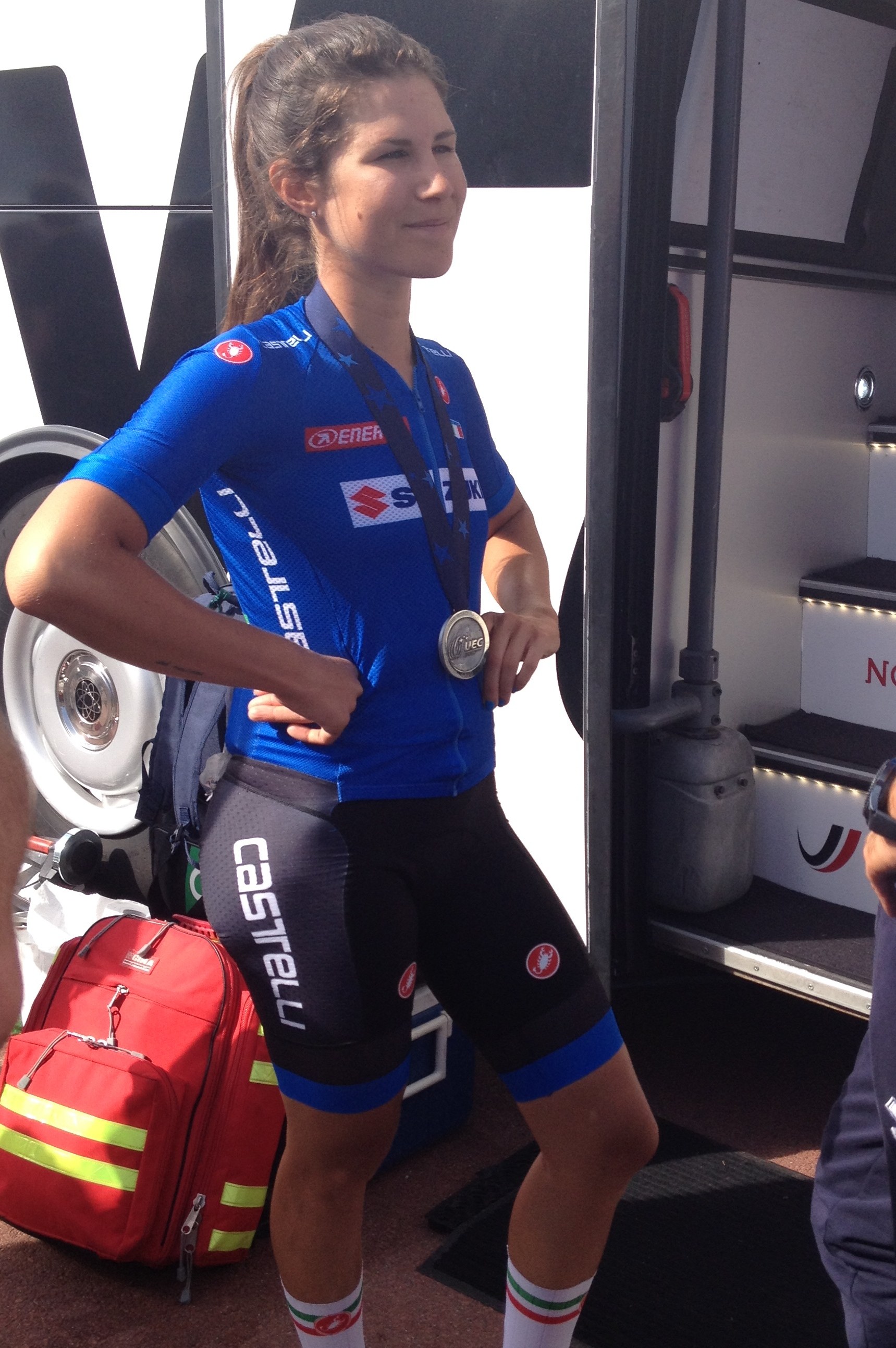 Wegwedstrijd voor vrouwen elite tijdens de Europese kampioenschappen wielrennen in Alkmaar op zaterdag 10 augustus 2019.